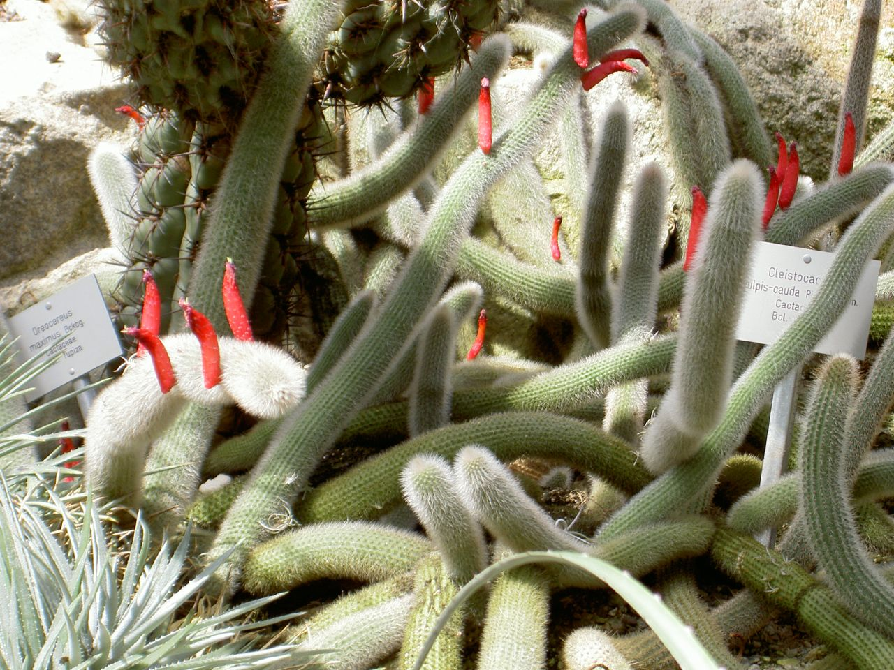 Cleistocactus brookeae subsp. vulpis-cauda